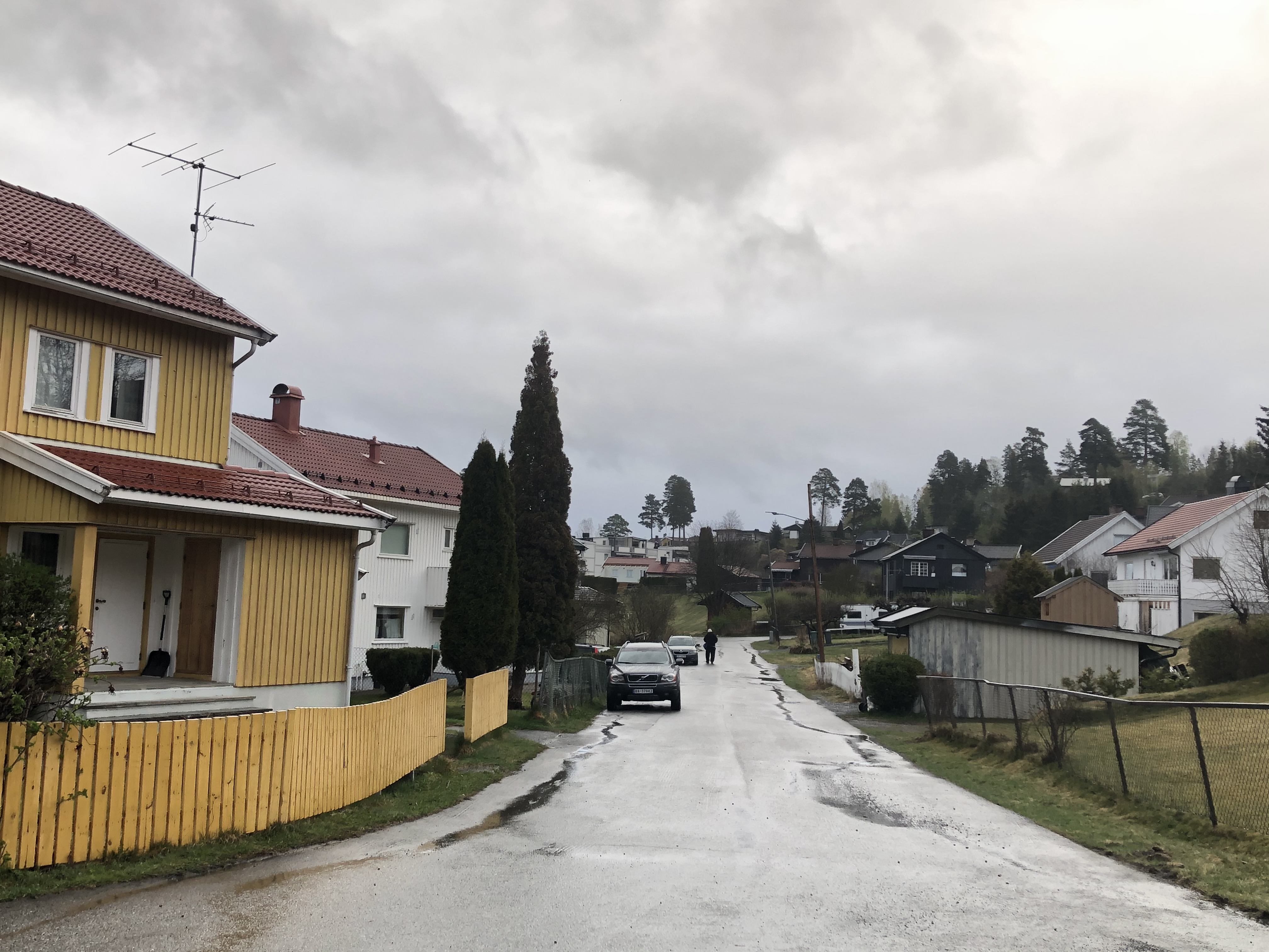 Edvard Griegs vei, Ringerike.